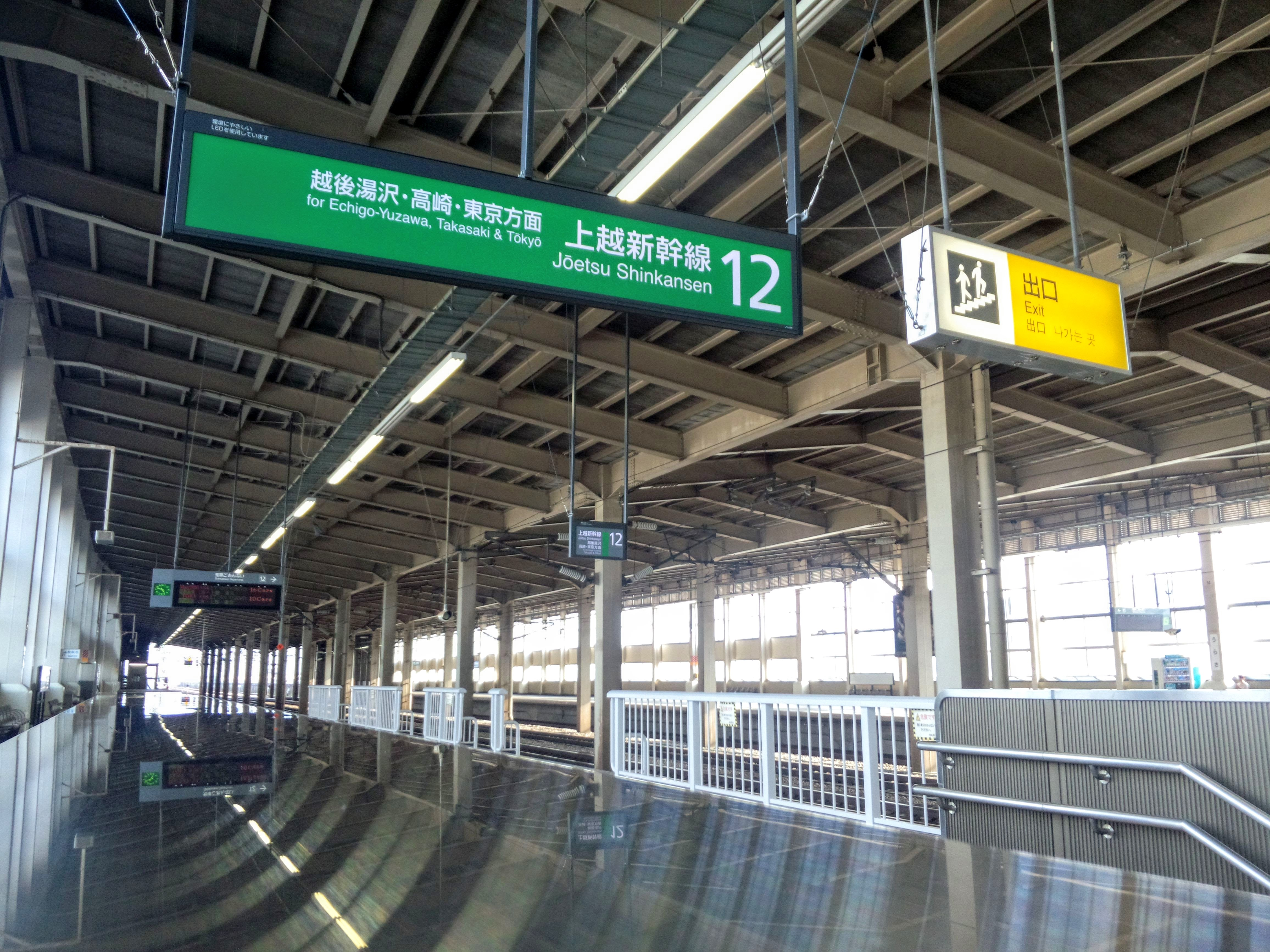 浦佐駅の新幹線ホーム（12番線）